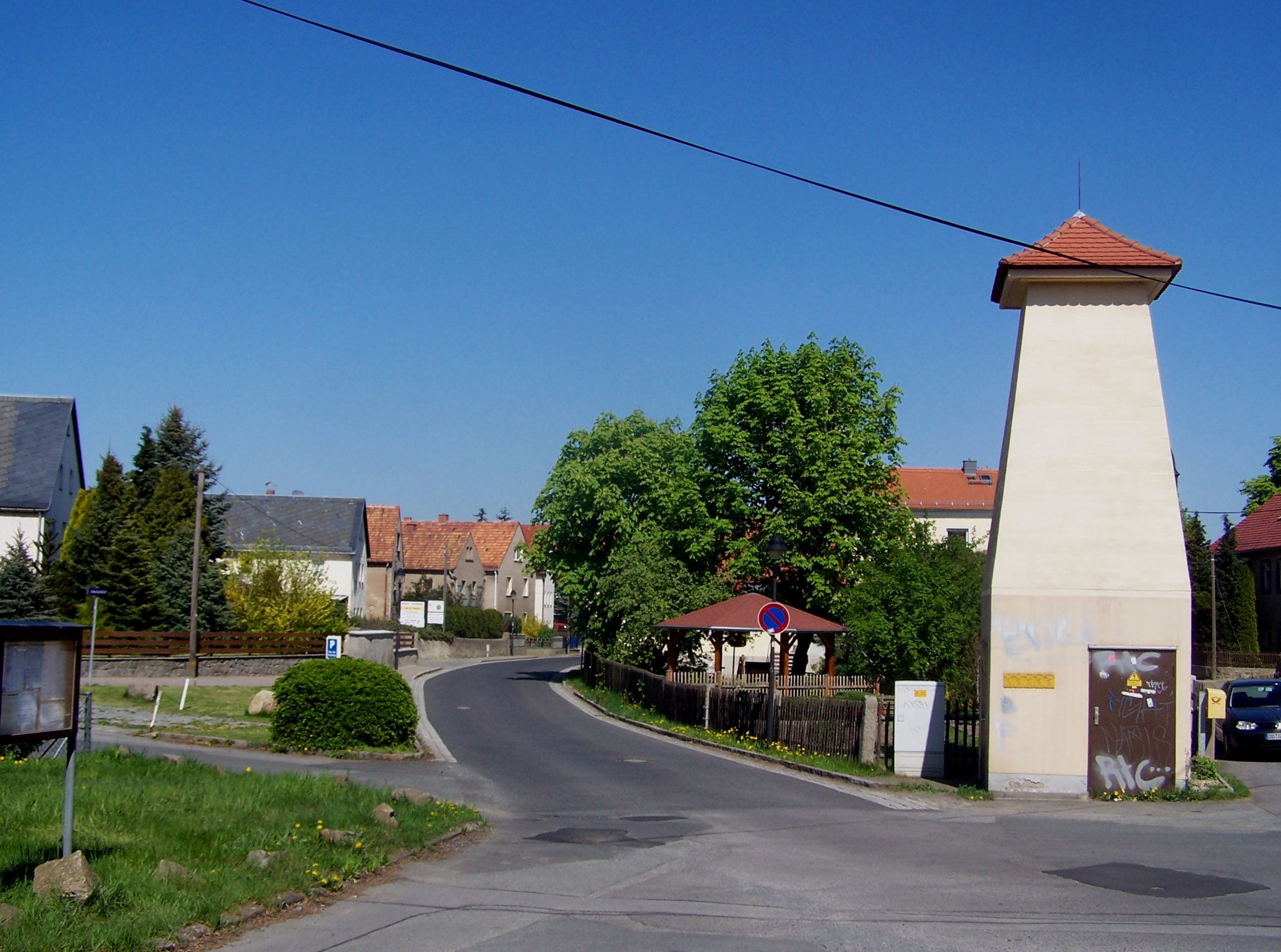 Der Dorfkern des Dresdner Stadtteils Wilschdorf, vom Alten Gasthof aus gesehen.